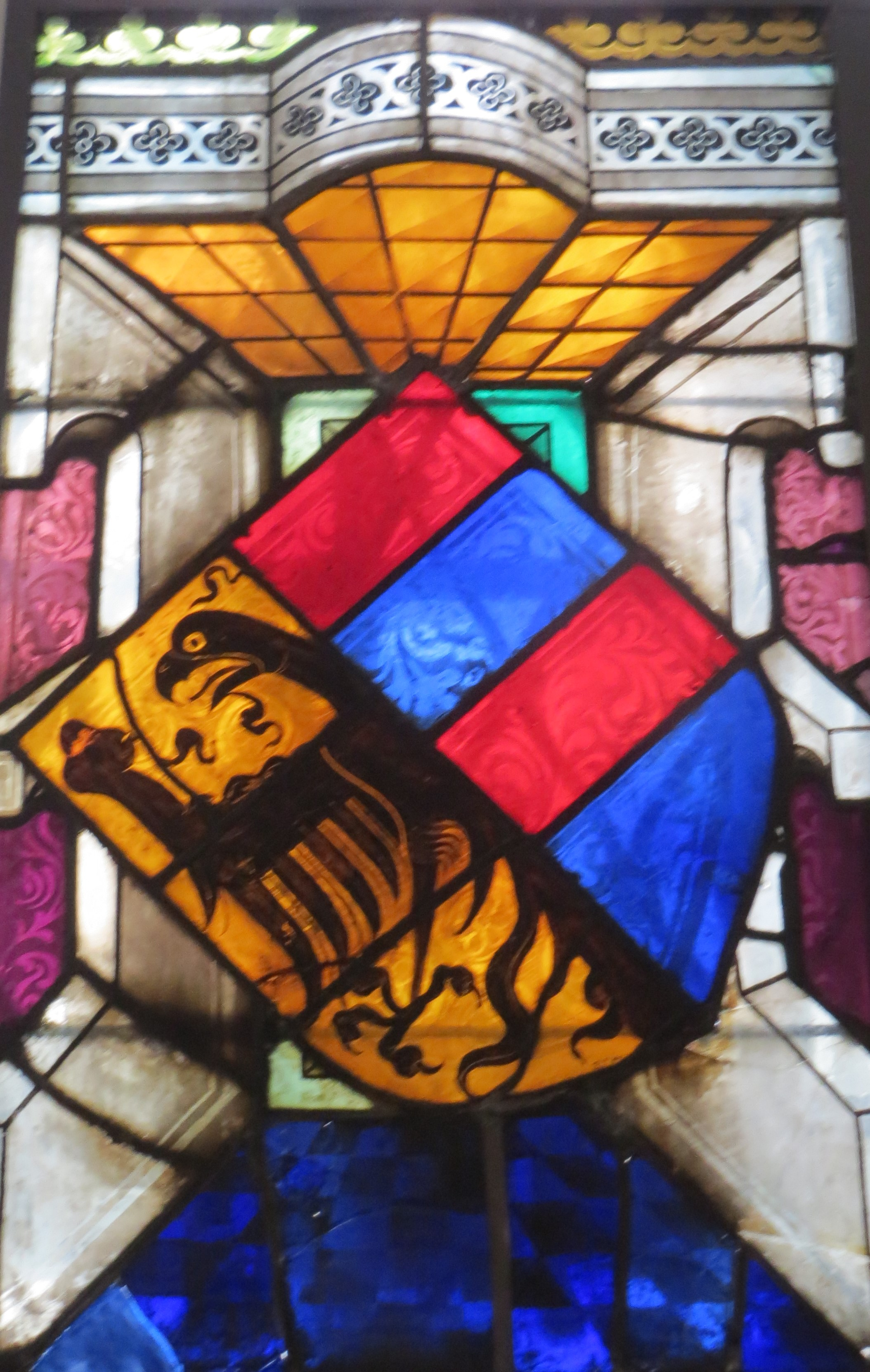 Glasfenster aus St. Katharinen im St.-Annen-Museum: Wappen Heinrich Kastorp (+ 1487)